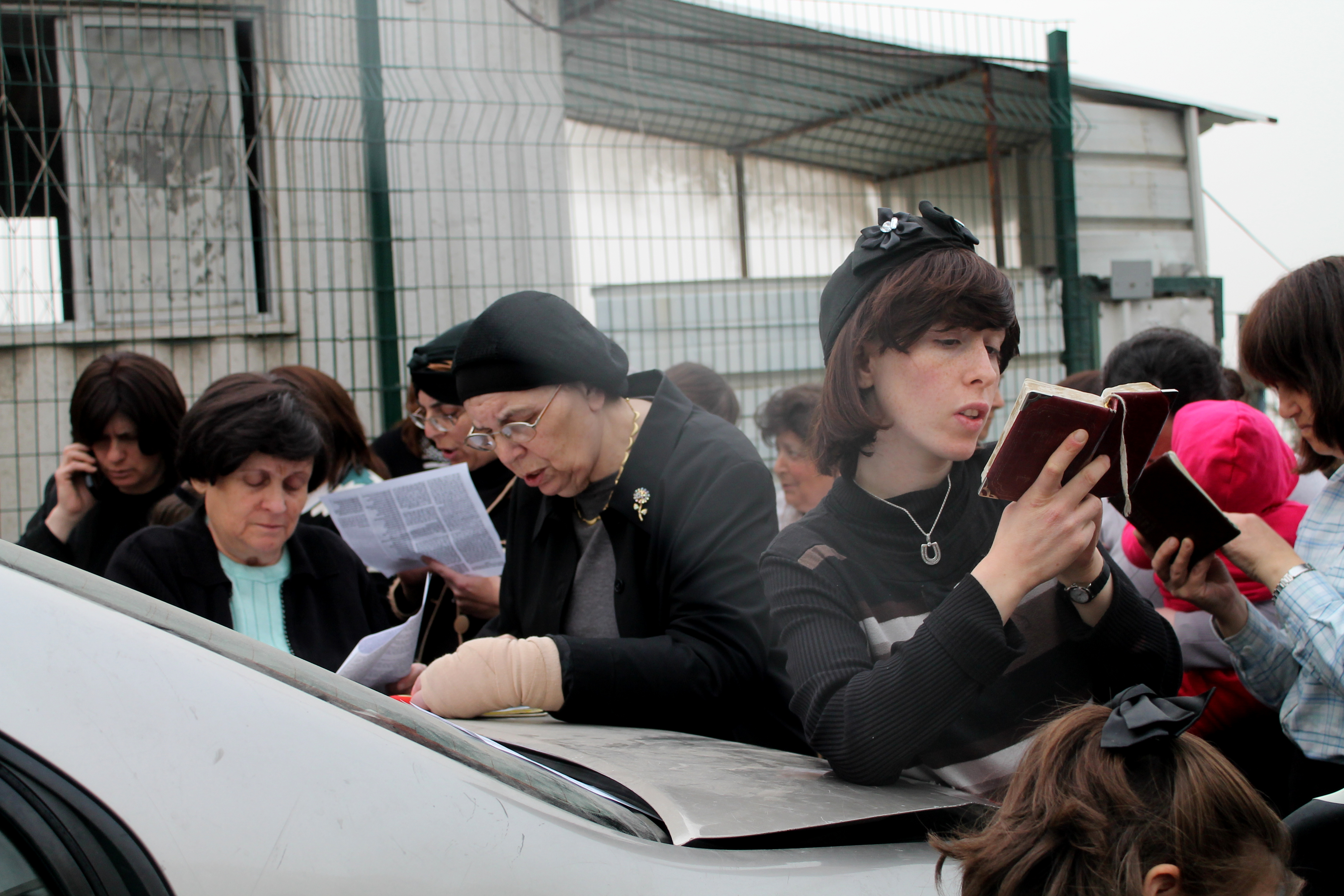 עצרת נגד הגיוס 2014